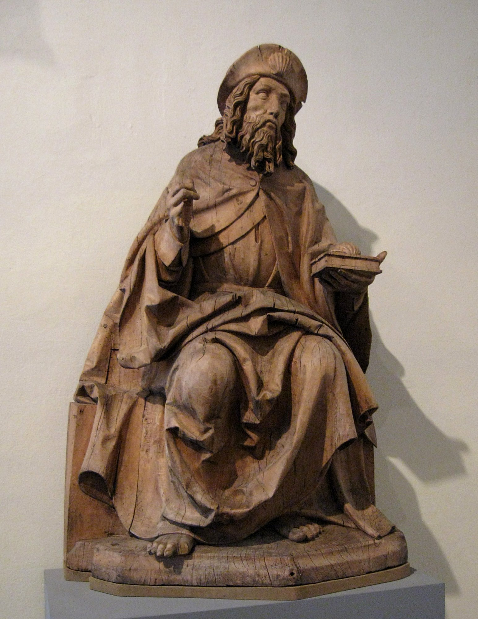 Meister von Rabenden: Heiliger Jakobus, Lindenholz, Bayerisches Nationalmuseum in München